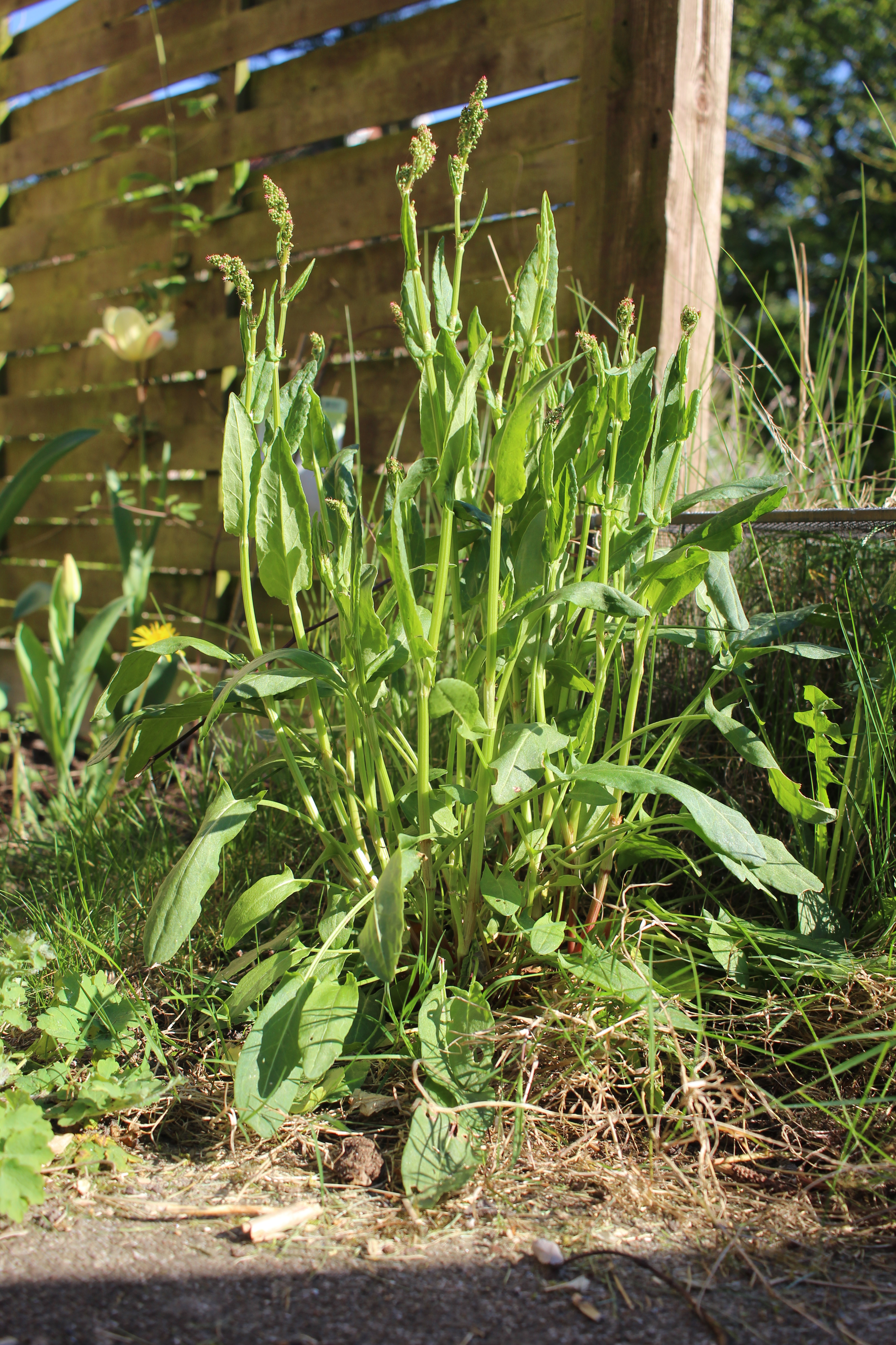 Rumex acetosa L., Søborg, Denmark, 8 May 2016